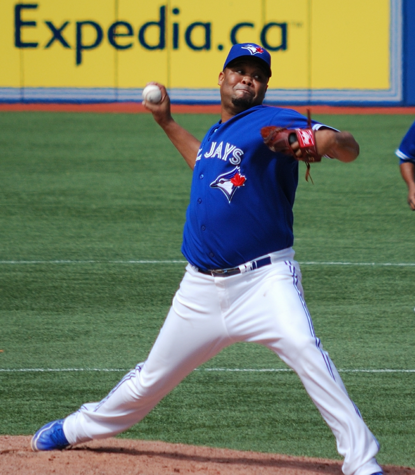 Francisco Cordero